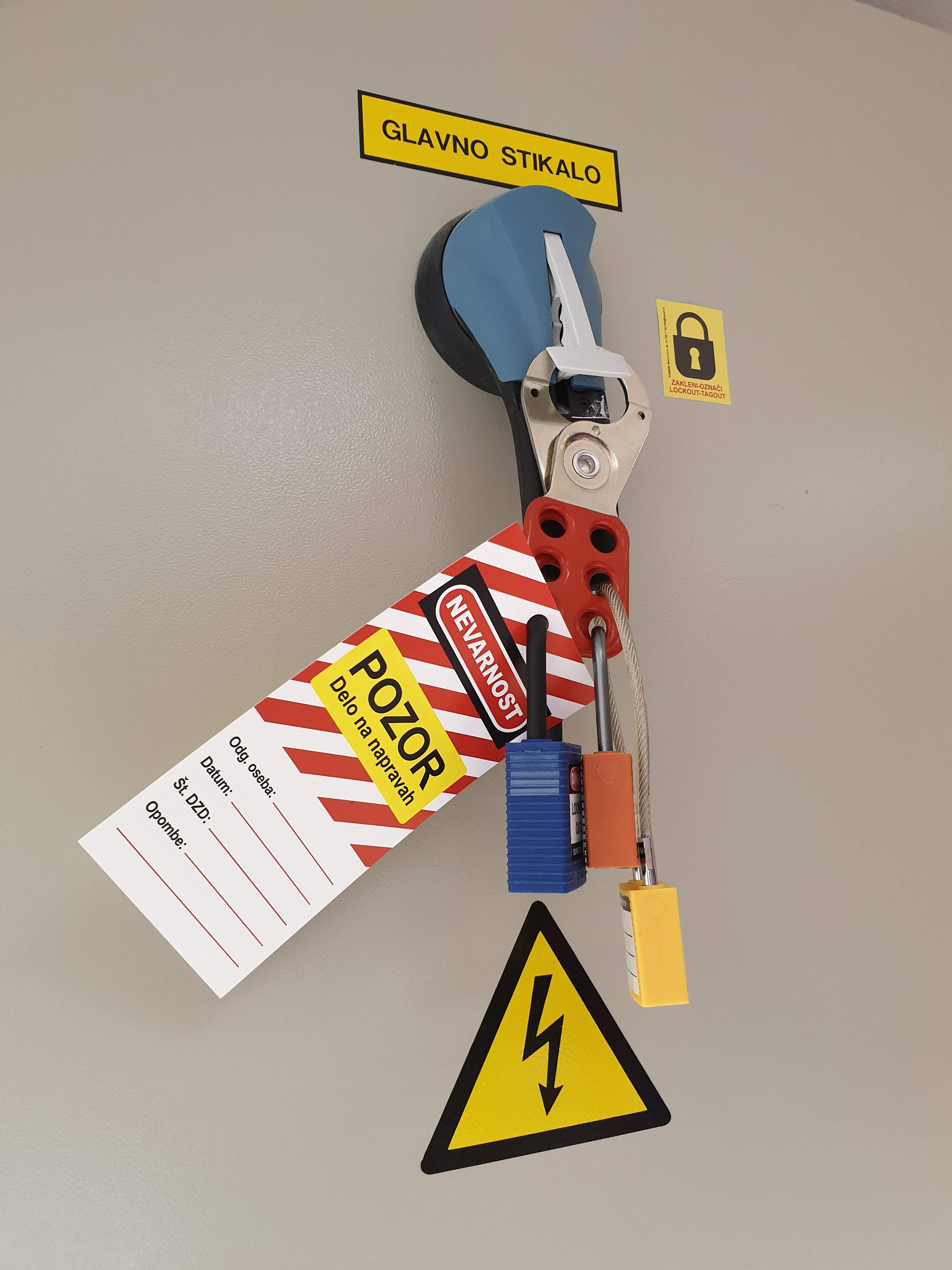 Primer zaklepanja stikala z uporabo škarij za skupinsko zaklepanje